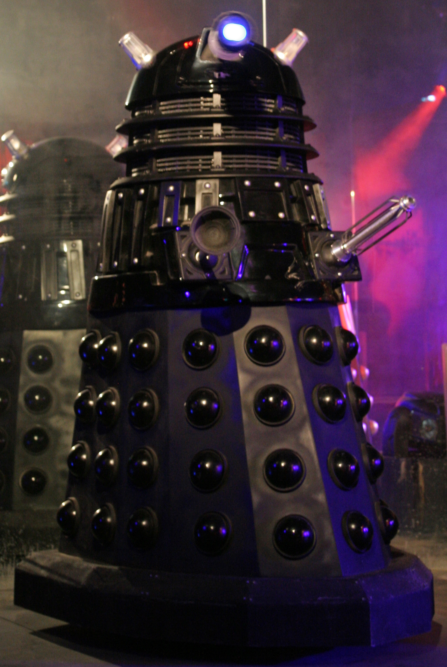 Dalek 1